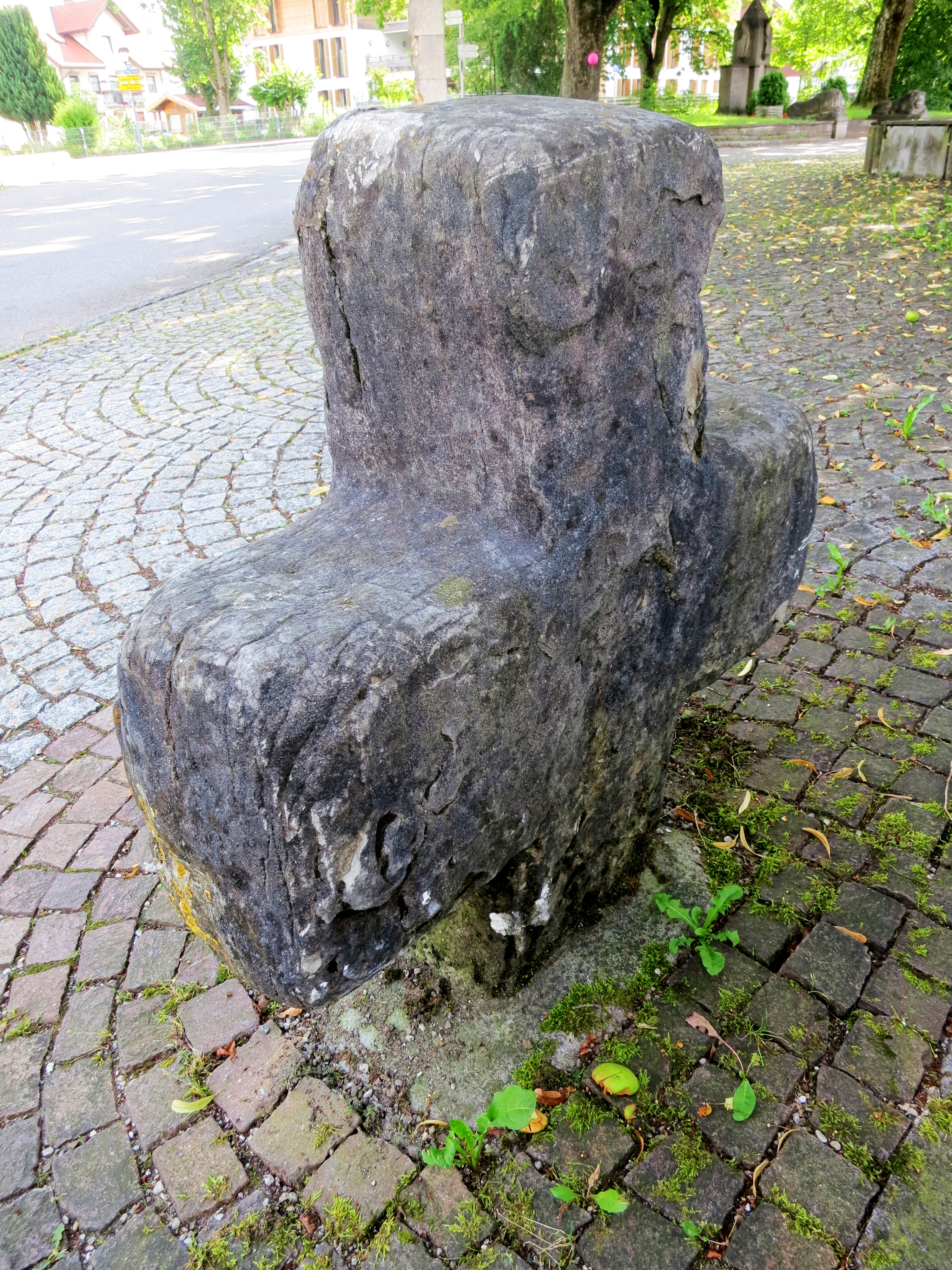 Das Sühnekreuz in Betzigau in der Kirchstraße unmittelbar vor der Kirche St. Afra. Ansicht aus West (Rückseite)